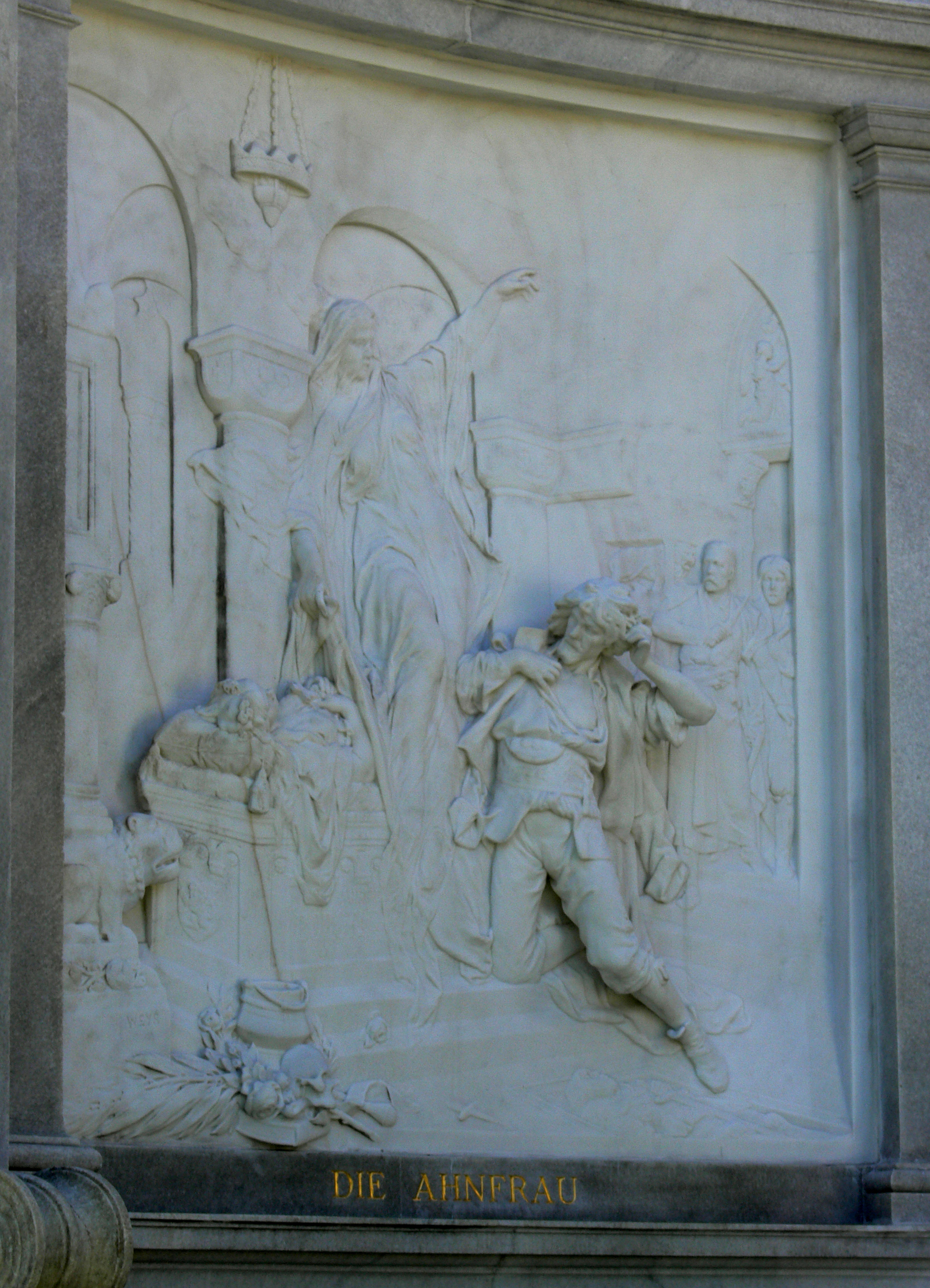 Grillparzer-Denkmal im Volksgarten, Wien, 1889 Relief "Die Ahnfrau" von Rudolf Weyr